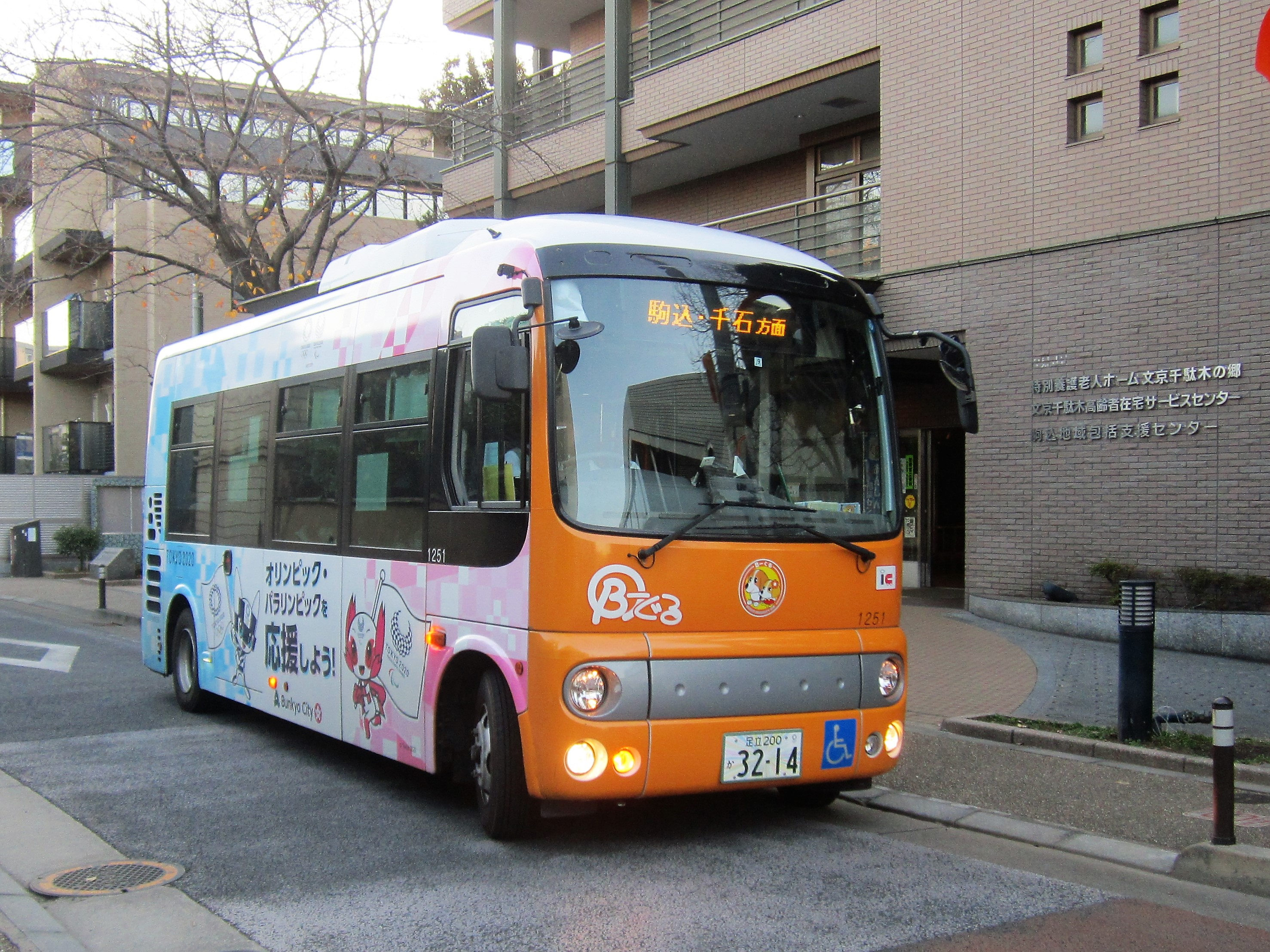 千駄木の郷付近を走行する文京区コミュニティバス「Bーぐる」